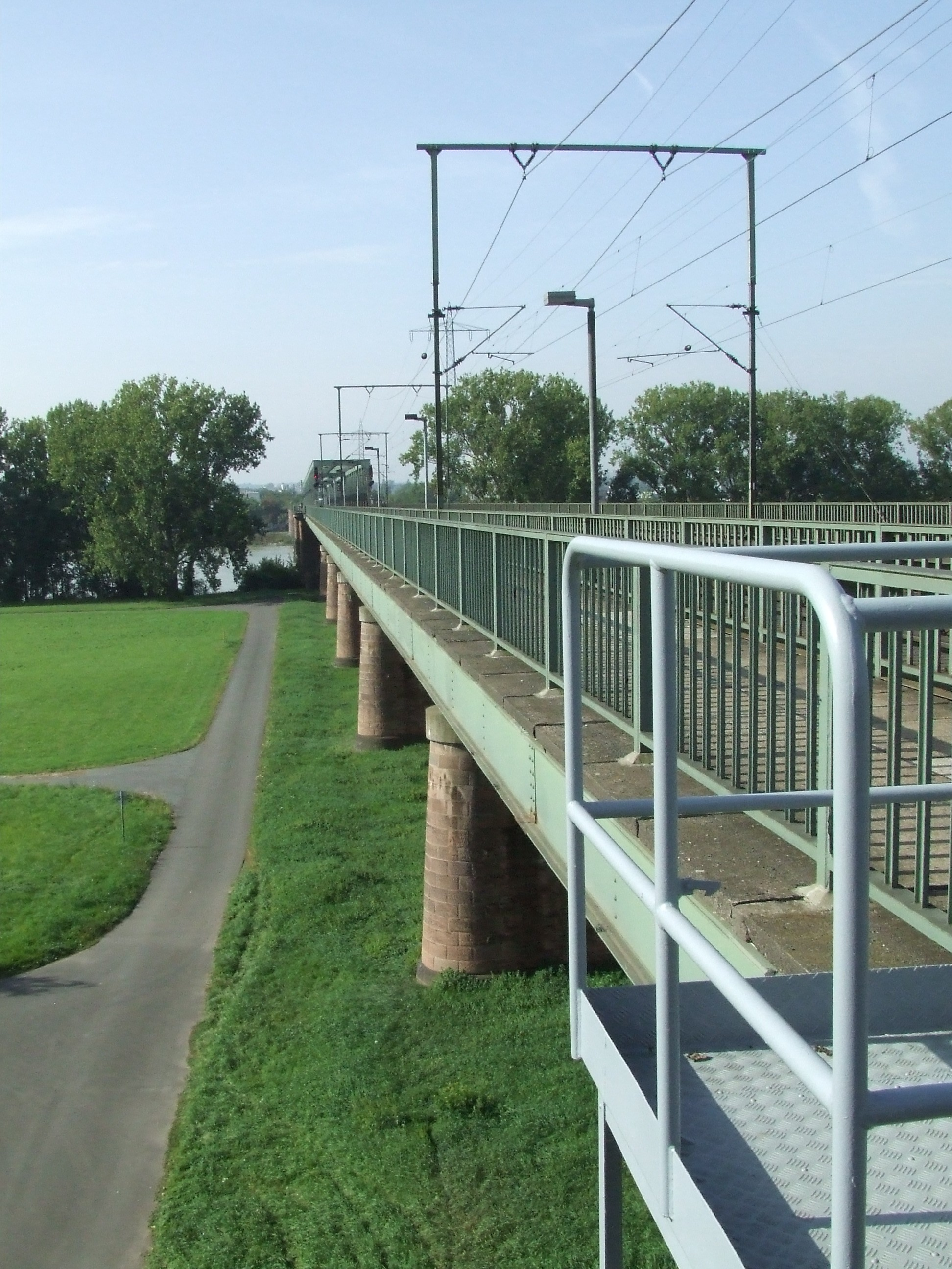 Kaiserbrücke zwischen Mainz und Wiesbaden